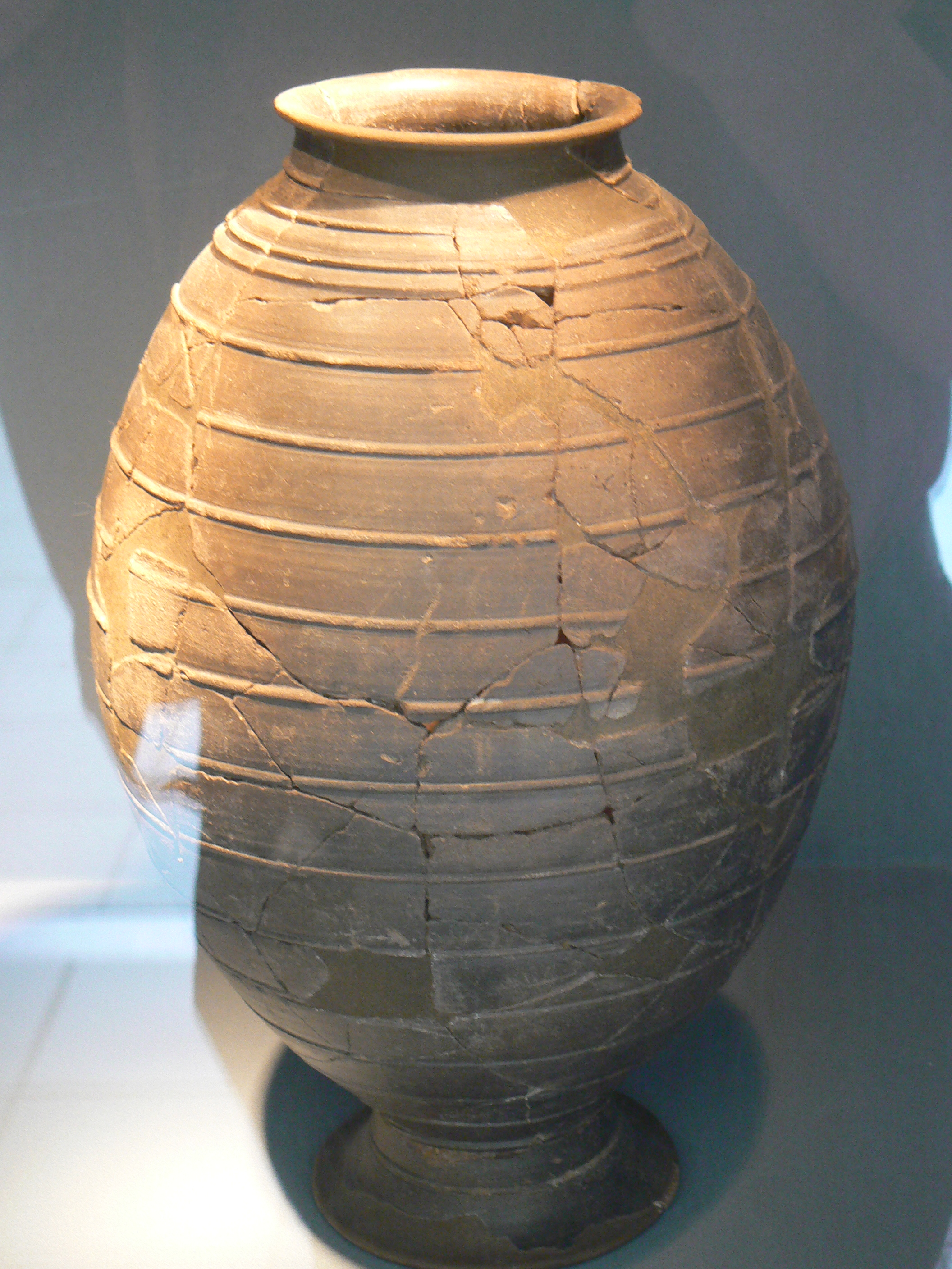 Céramique celte au musée de Jublains (Mayenne)